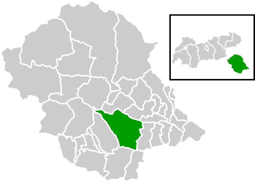 Lage der Gemeinde innerhalb des Bezirks Lienz